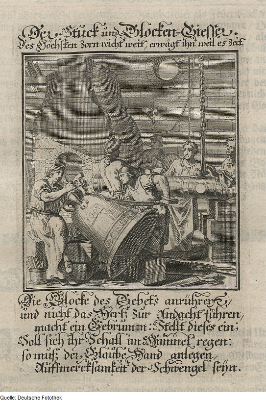 Original image description from the Deutsche Fotothek Ständebuch & Handwerk & Glockengießer & Geschützgießer & Stuck & Geschütz & Kanone & Glocke